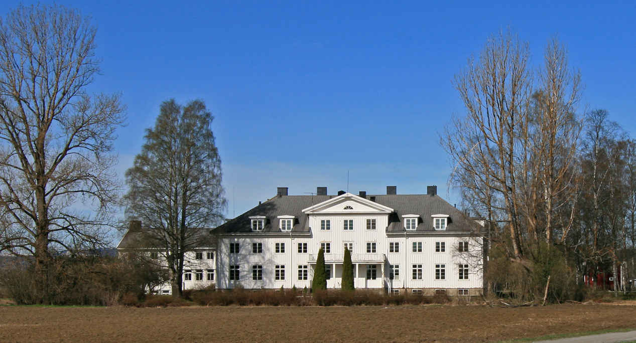 Mork husmorskole, Eidsvoll.